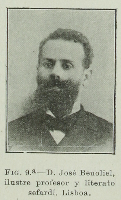 Portrait du Dr. José Benoliel célèbre écrivain et professeur sépharade résidant à Lisbonne (Portugal) דיוקן של פרופ' יוסף בן עוליאל